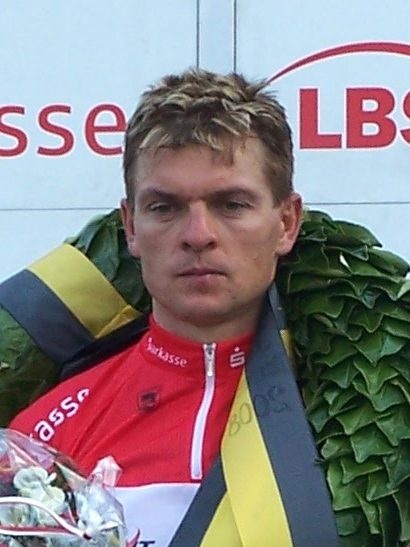 Die Aufnahme entstand beim Einzelzeitfahren der Sachsen-Tour 2008 in Großenhain